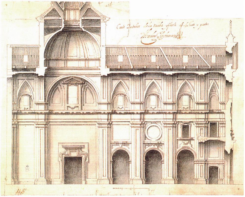 Teodoro Ardemans, proyecto para la iglesia de Santos Justo y Pastor de Madrid.